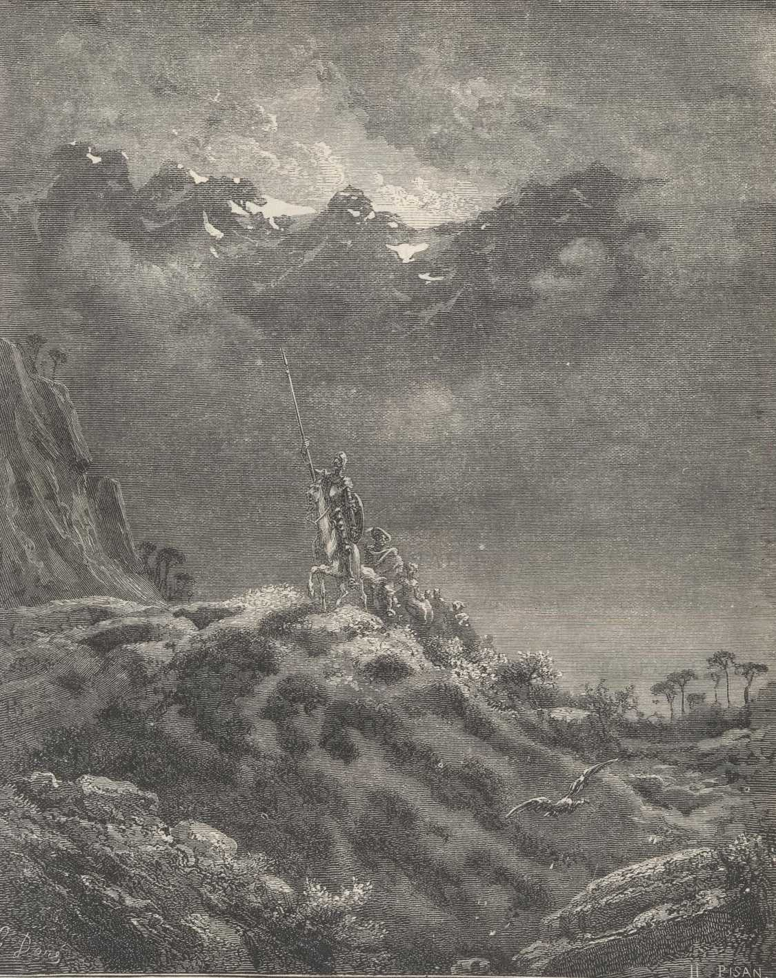 Ilustração de Gustave Doré para a edição de 1863 de "Dom Quixote" de Miguel de Cervantes